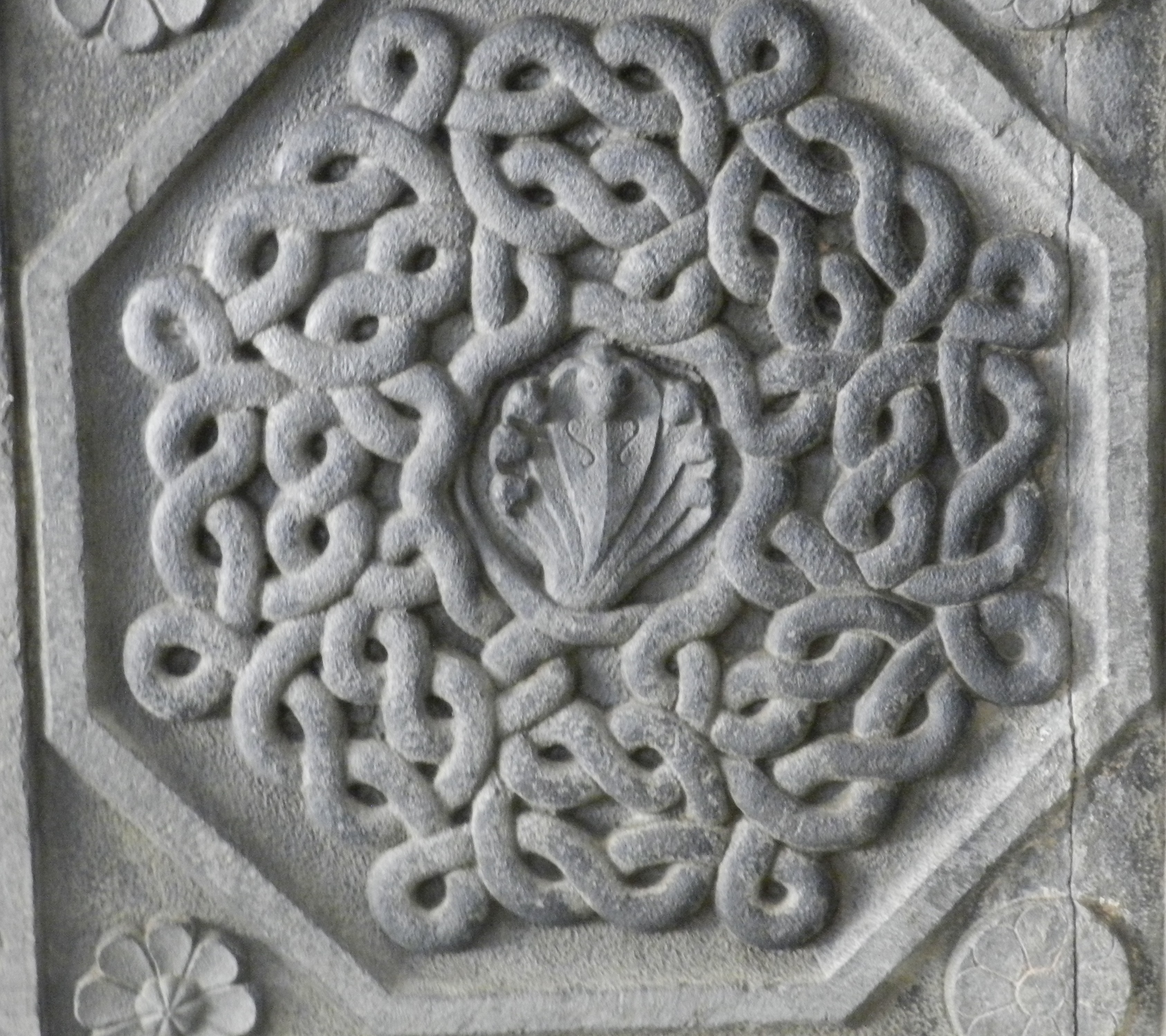 ಕನ್ನಡ: 'ಸರ್ಪಬಂಧ'ದ ಸುಂದರ ಕೆತ್ತನೆ